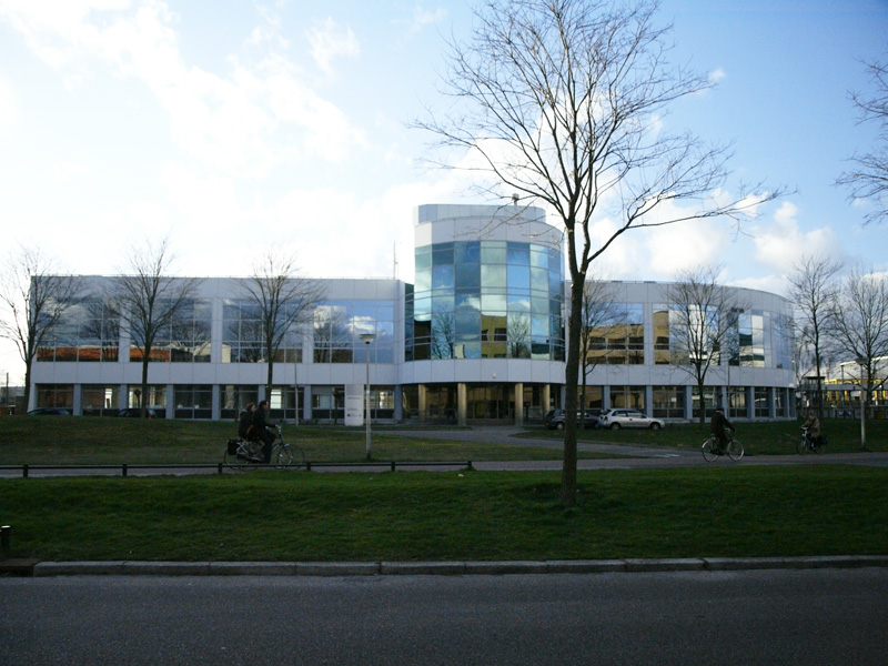 Het nieuwe hoofdkantoor van Super de Boer aan de Disketteweg.